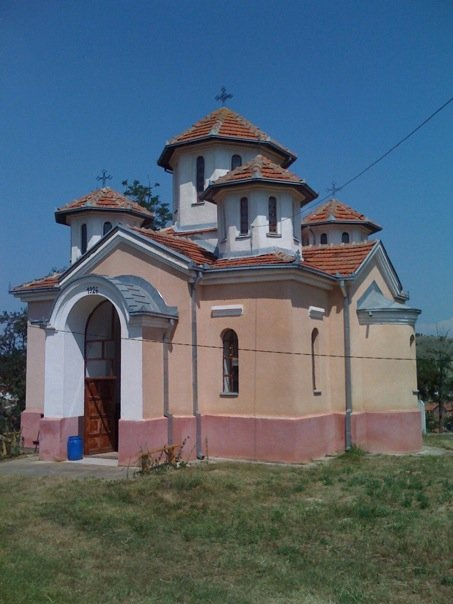 Cernica